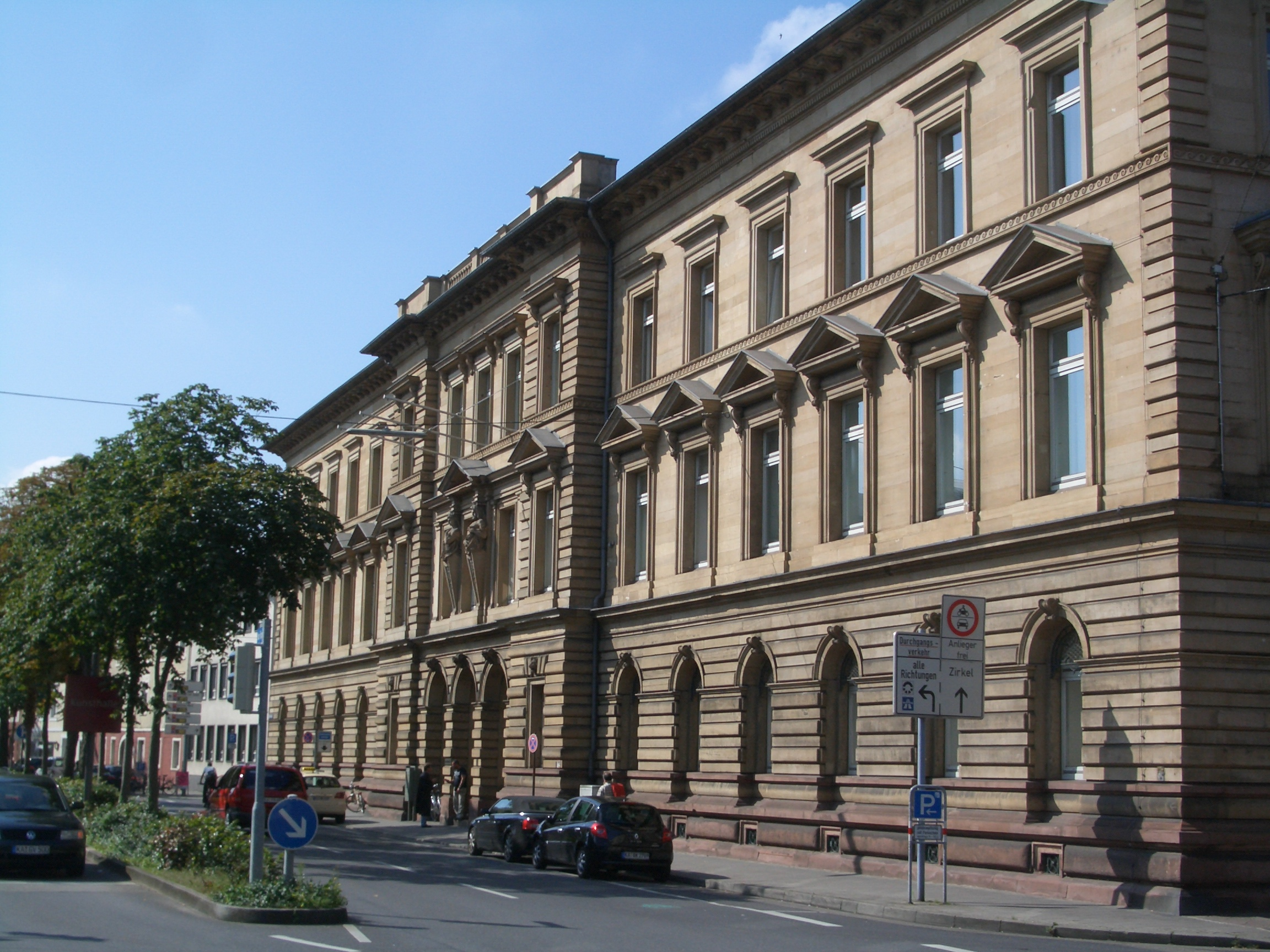 Landgericht Karlsruhe